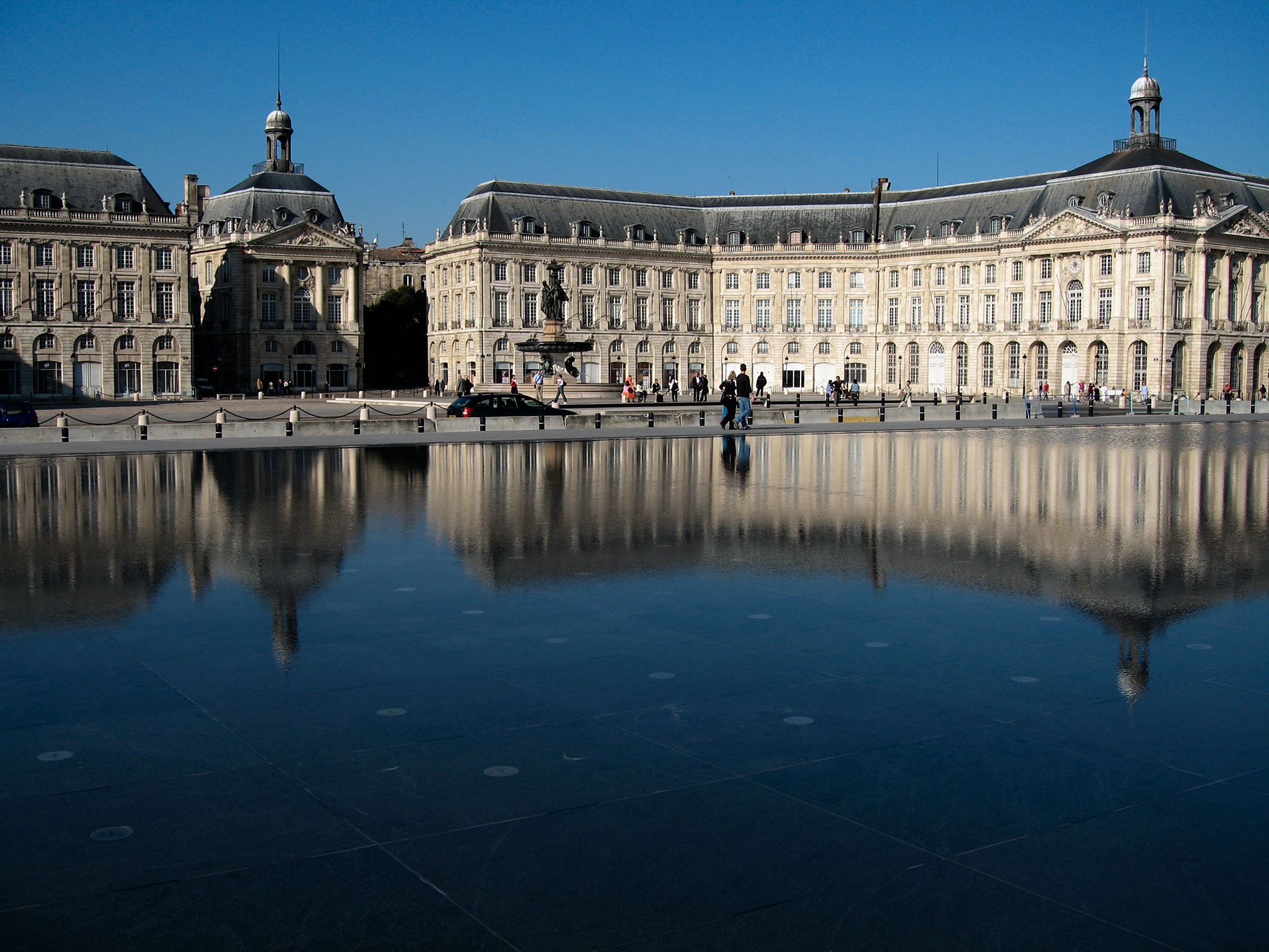 Miroir d'eau et place de la Bourse, Bordeaux, France